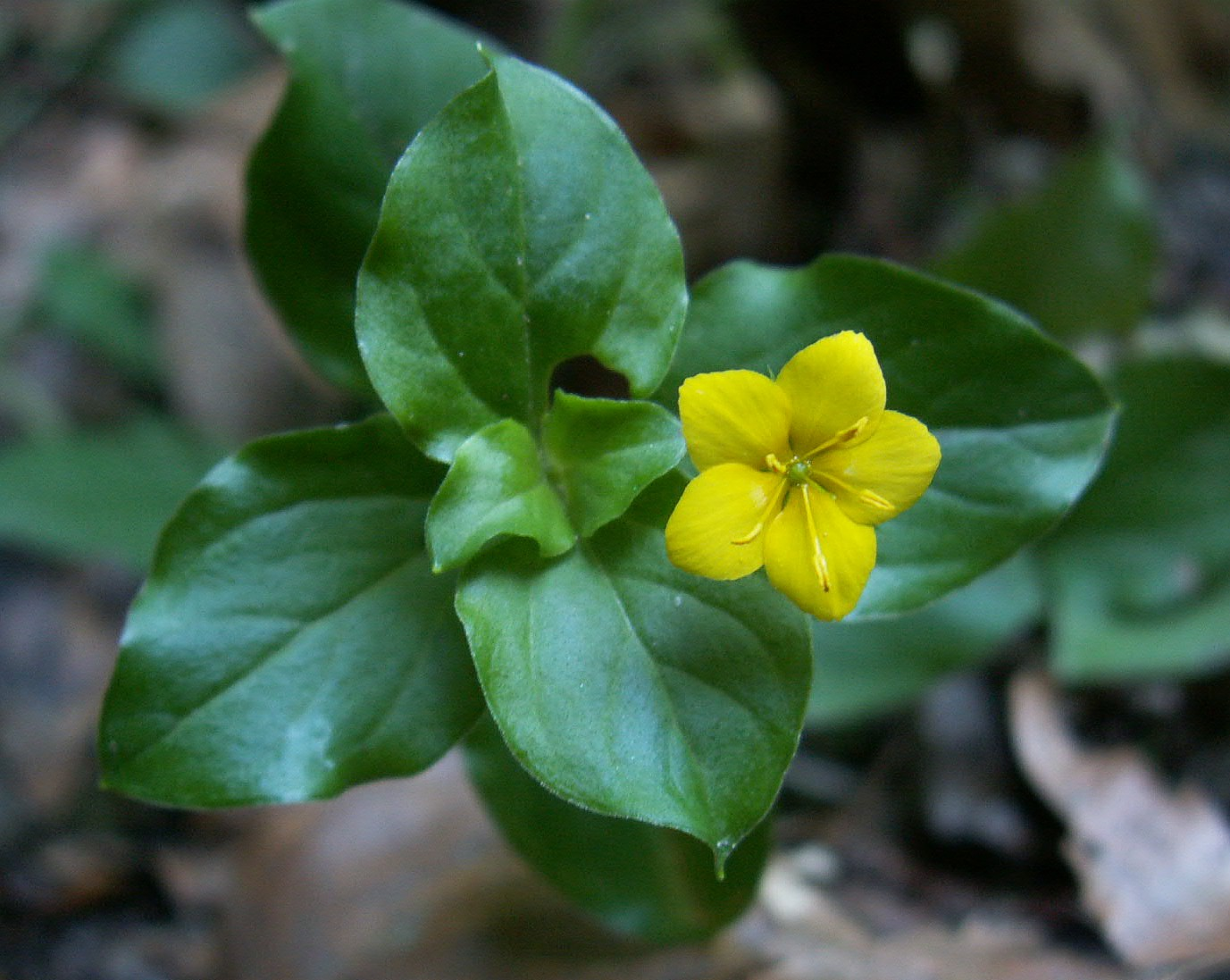 Lysimachia nemorum near Połczyn, NW Poland